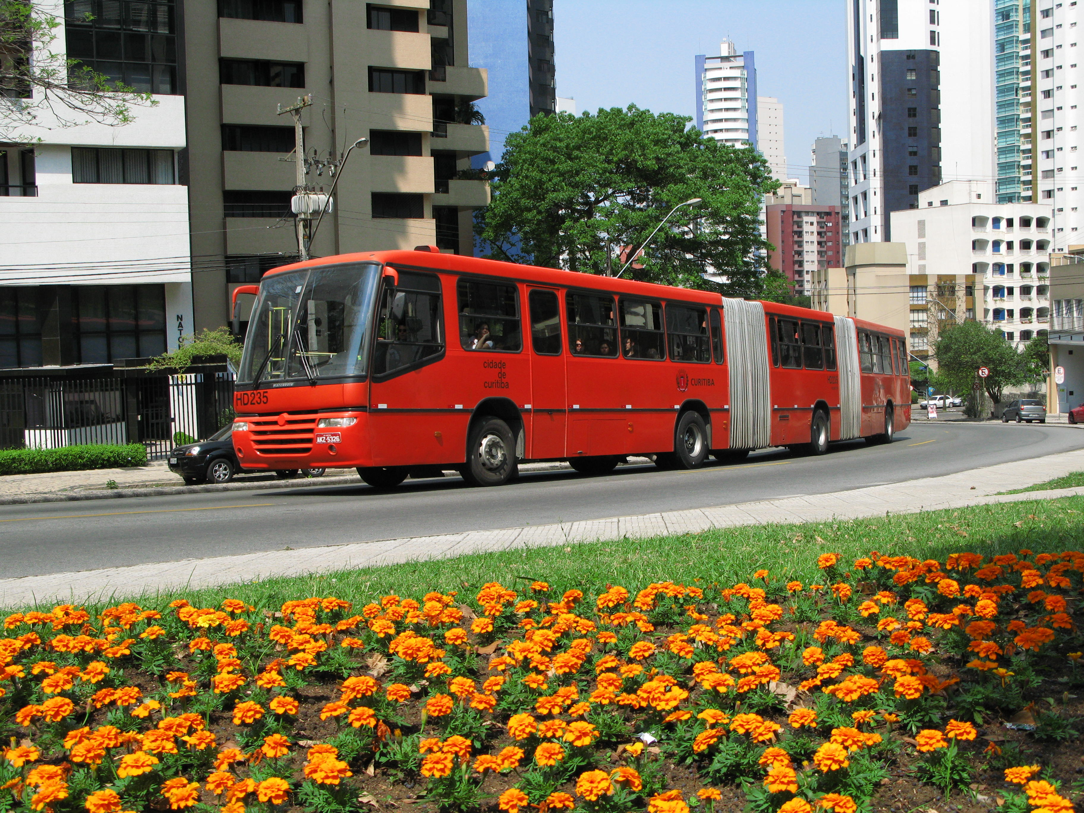 Biarticulado en Curitiba